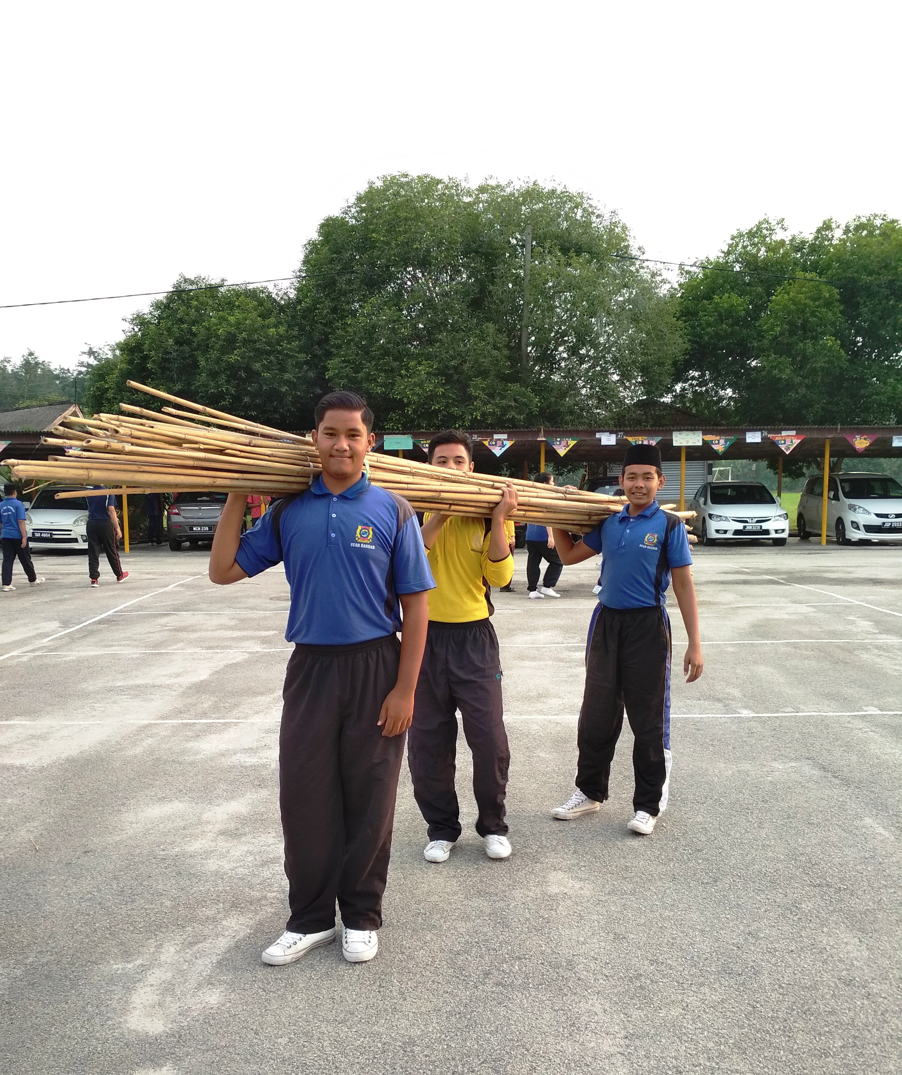 murid membantu memasang bendera di persekitaran sekolah